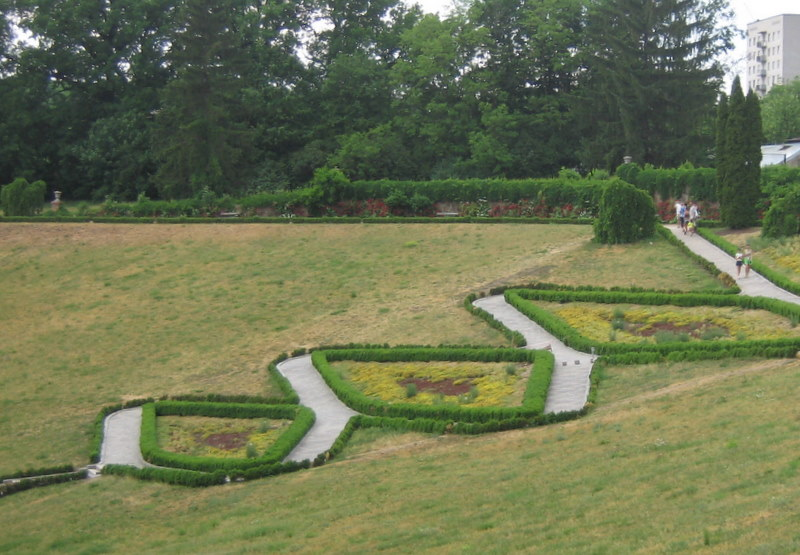 Партерный амфитеатр.